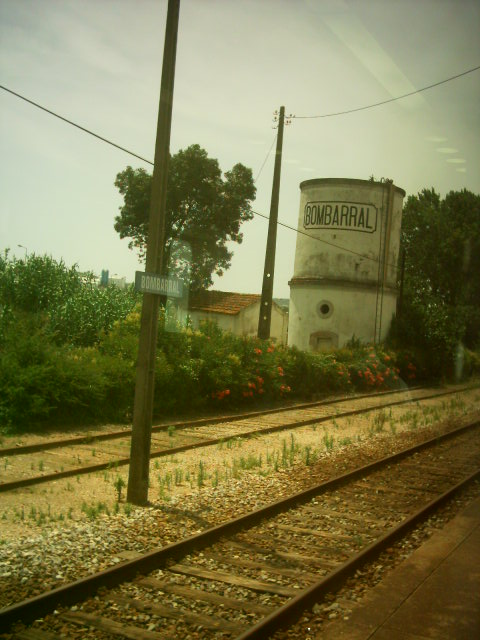 Estação ferroviária do Bombarral